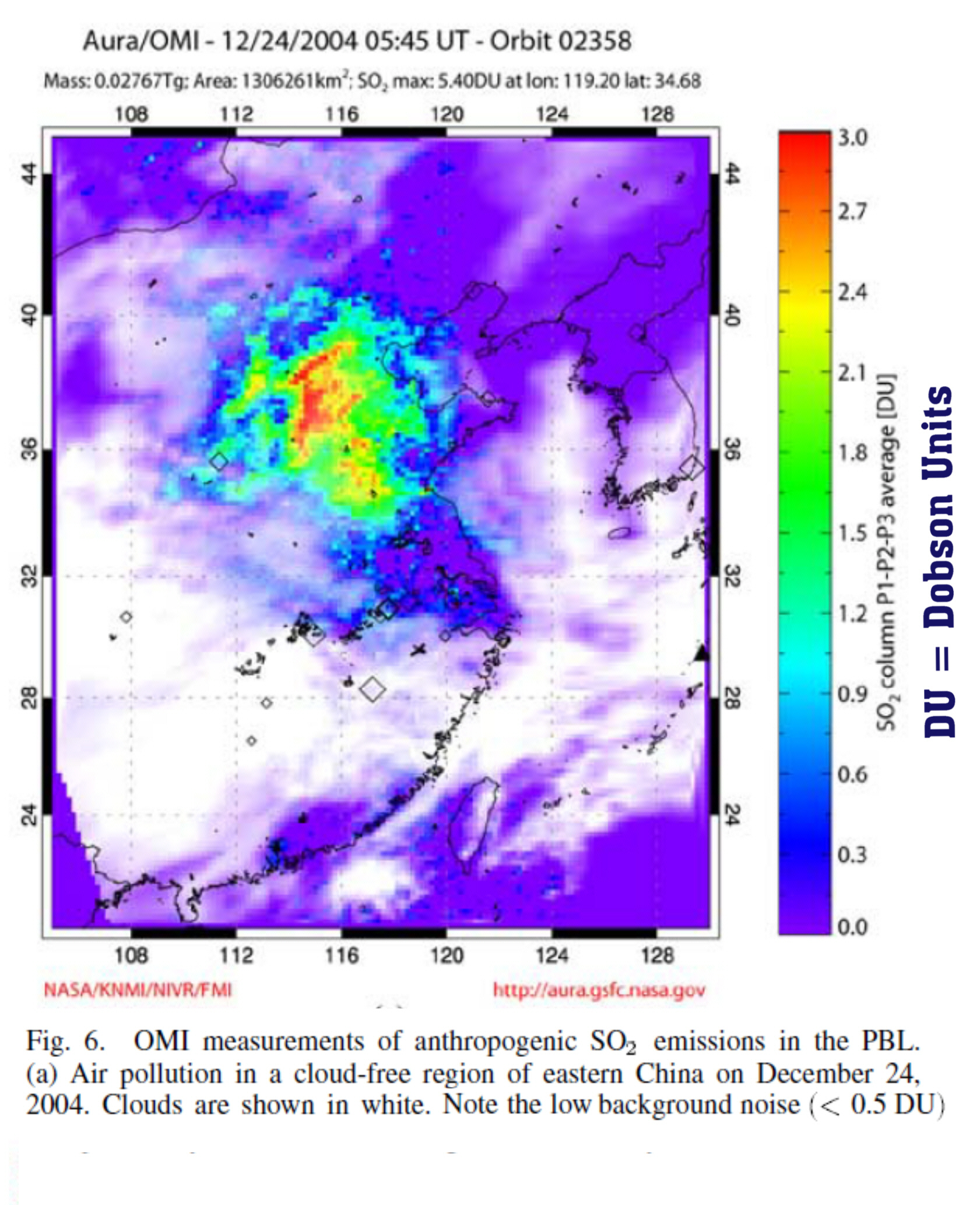 Satelittenmessung von Schwefeldioxid-Emissionen in Ostchina